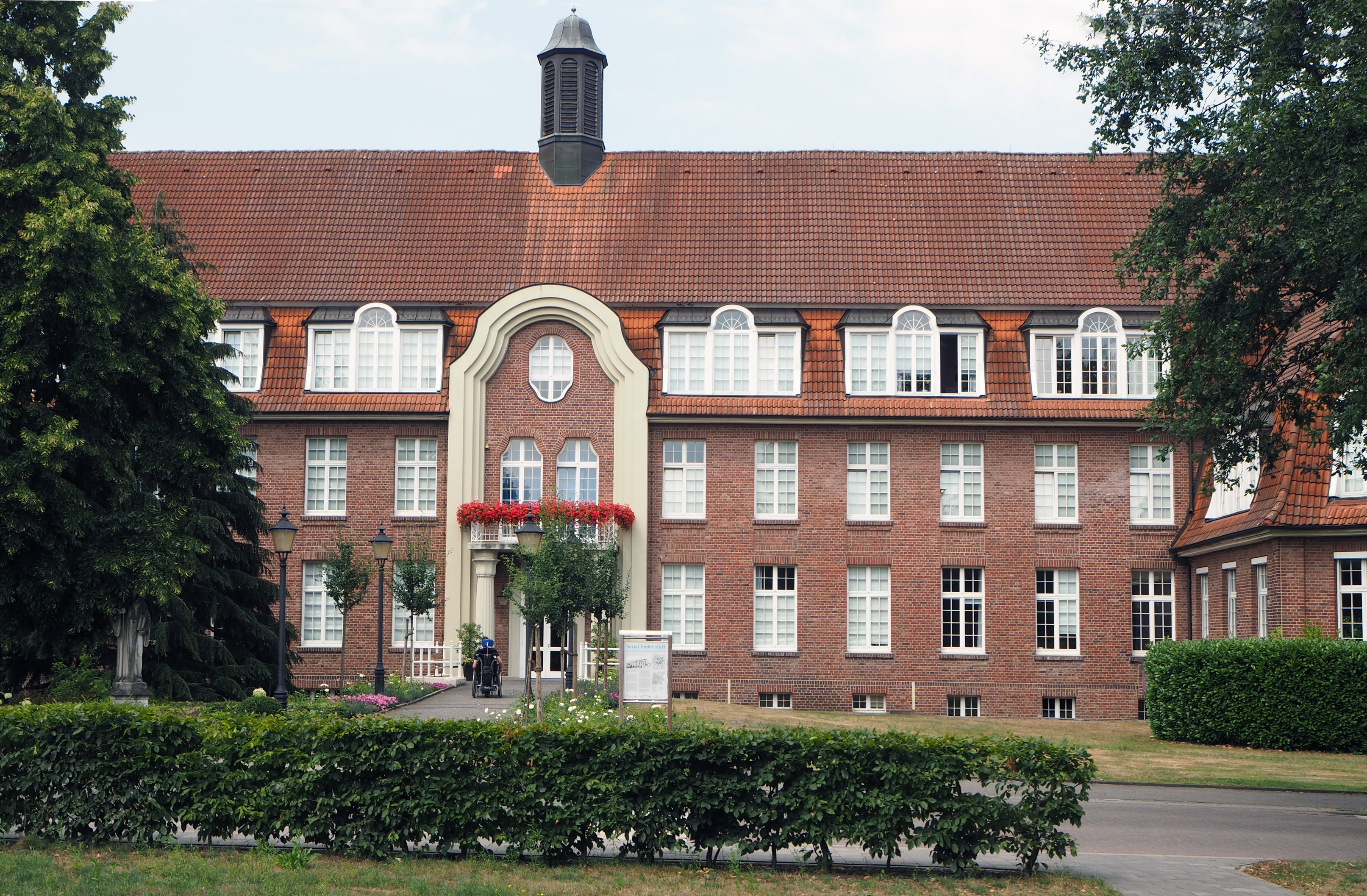 Maria Veen (Reken) Benediktushof, Baujahre 1913 bis 1915